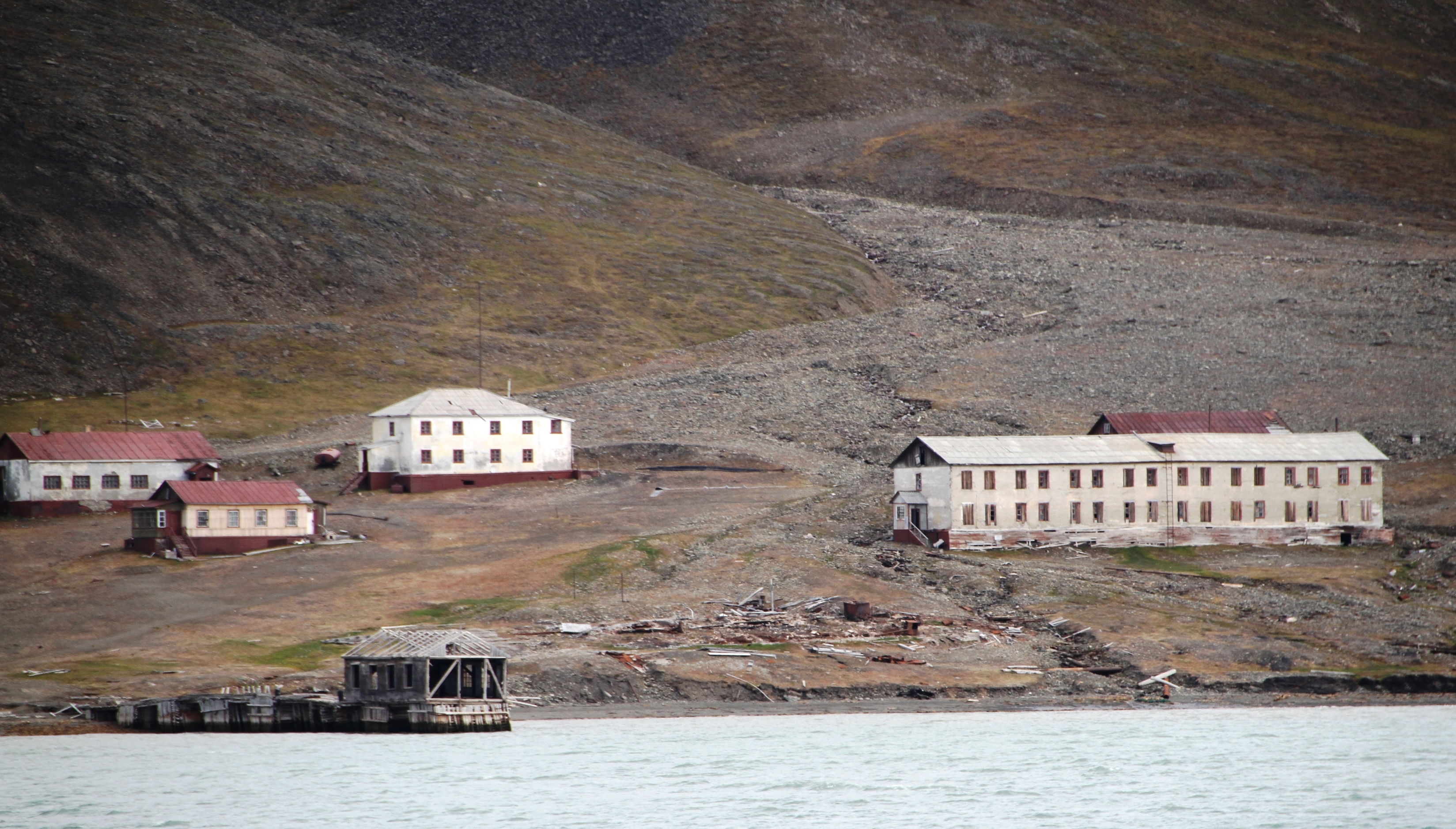 Coles Bay 20th century coal mining settlement, Svalbard.